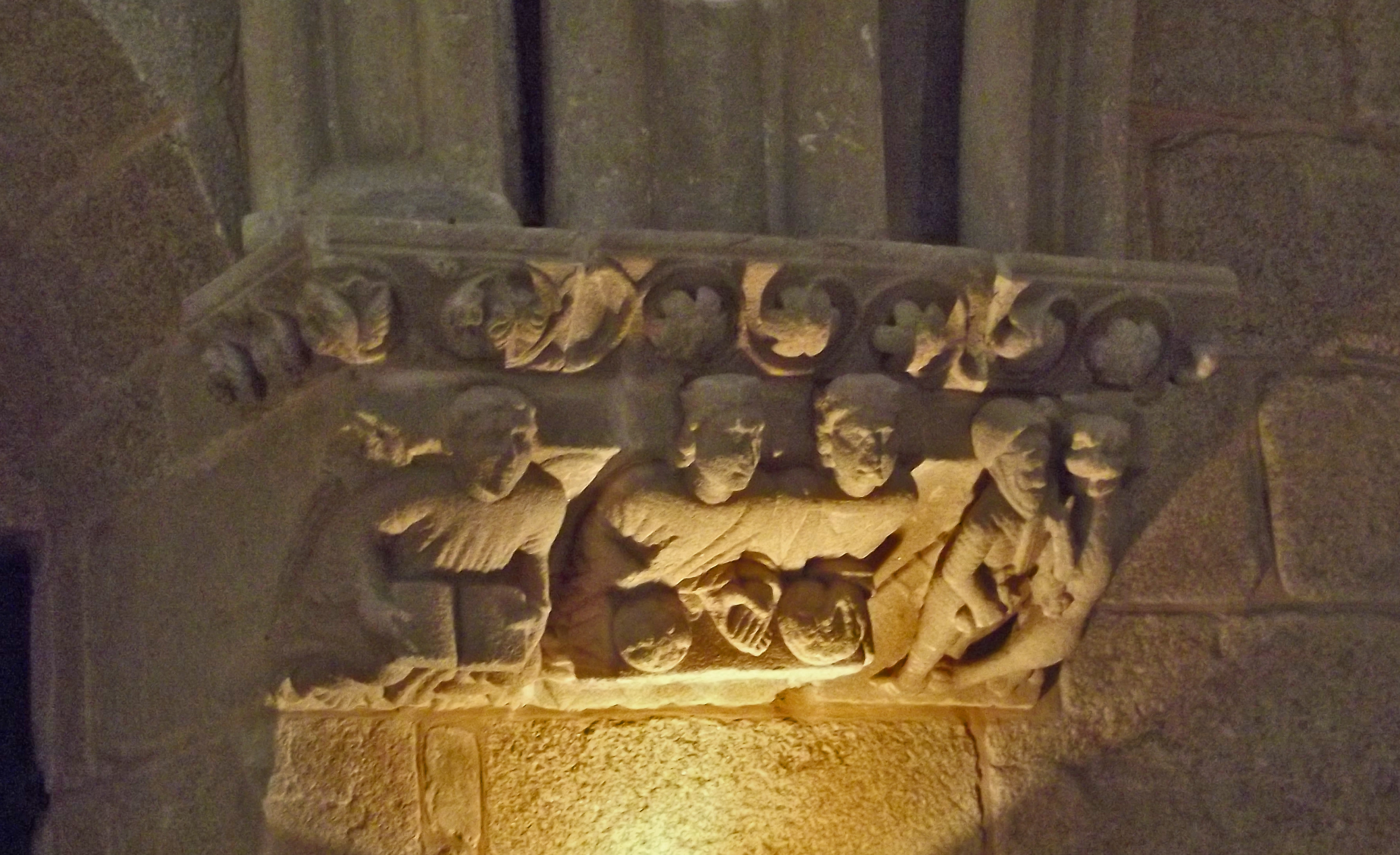 Esta foto participa en el juego En otro lugar de Flickr. Si no perteneces al grupo, no contestes, por favor. Si quieres contestar, únete